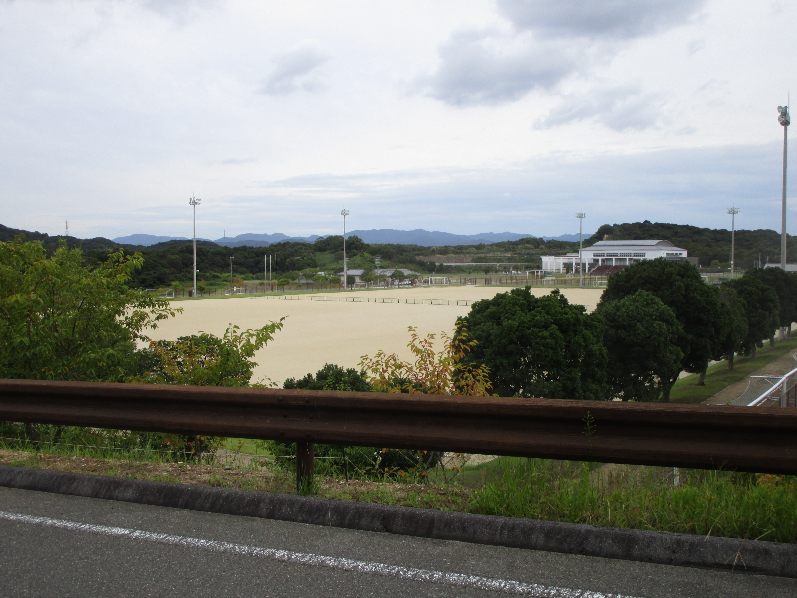 アスパ五色（五色台運動公園）